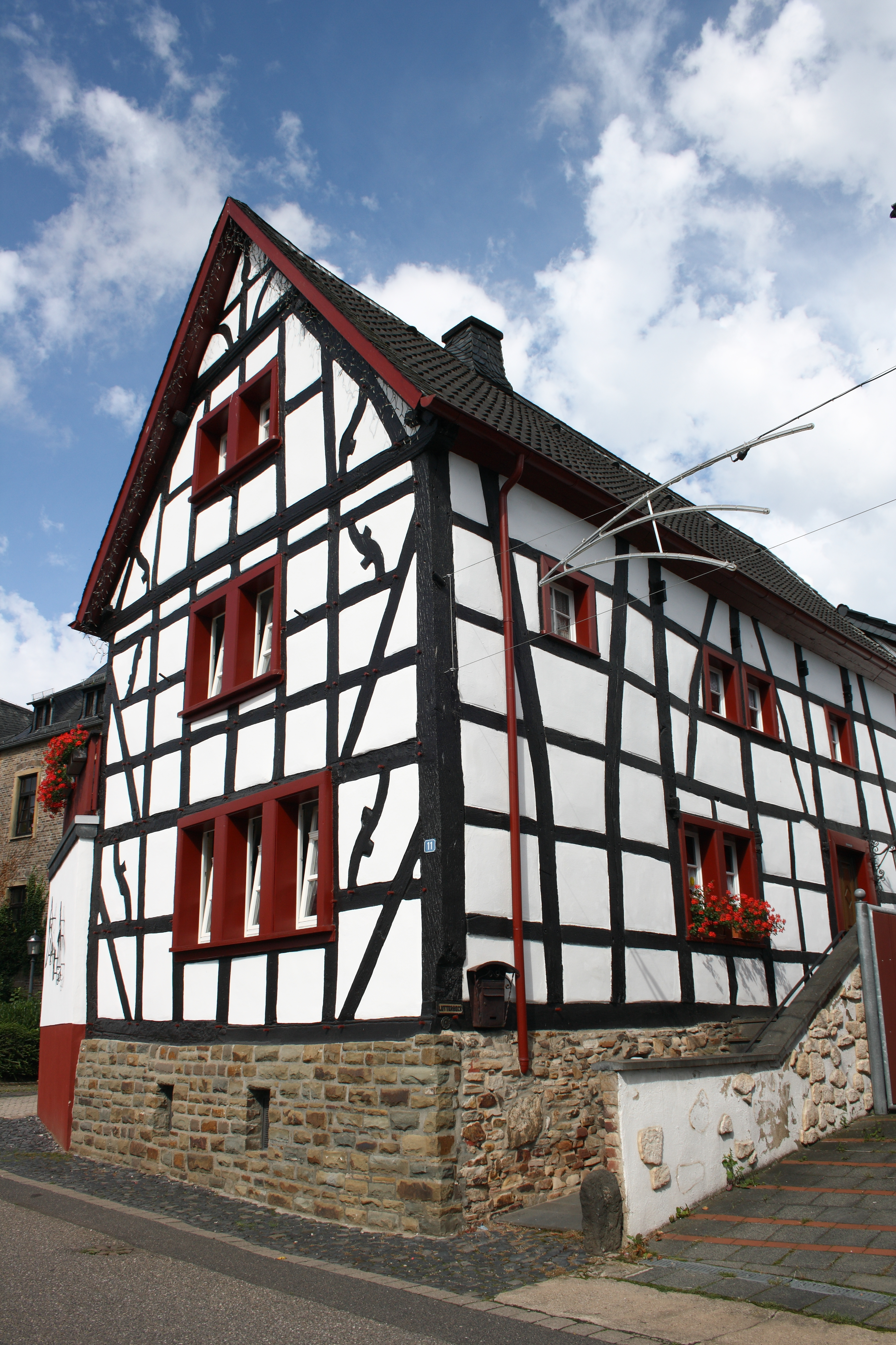 Fachwerkhaus in Odendorf, einem Ortsteil von Swisttal im Rhein-Sieg-Kreis, Orbachstraße 11